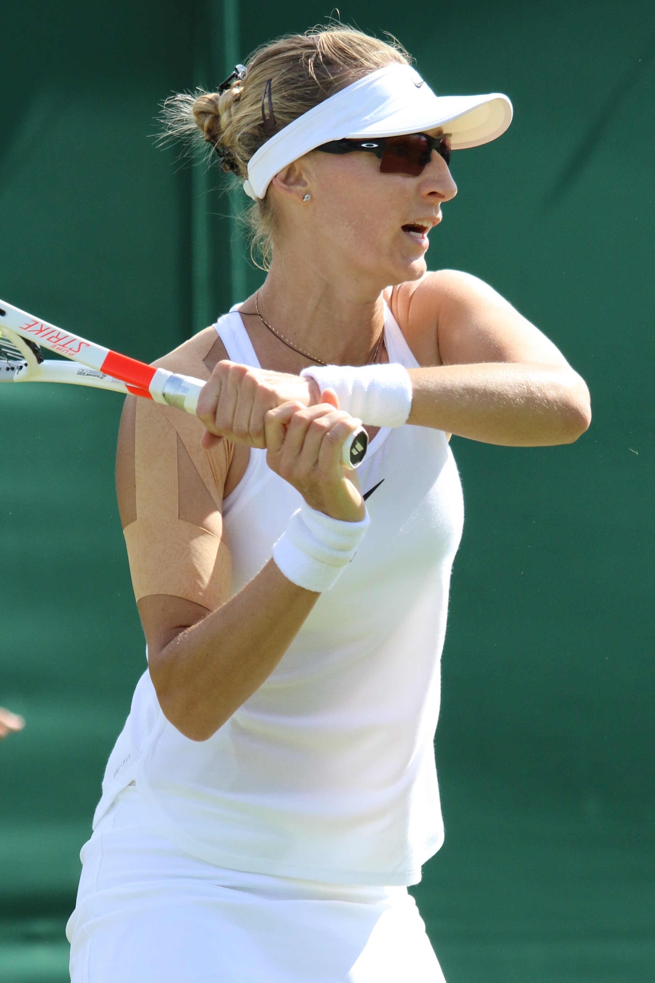 Lucic Baroni WM17 (10)